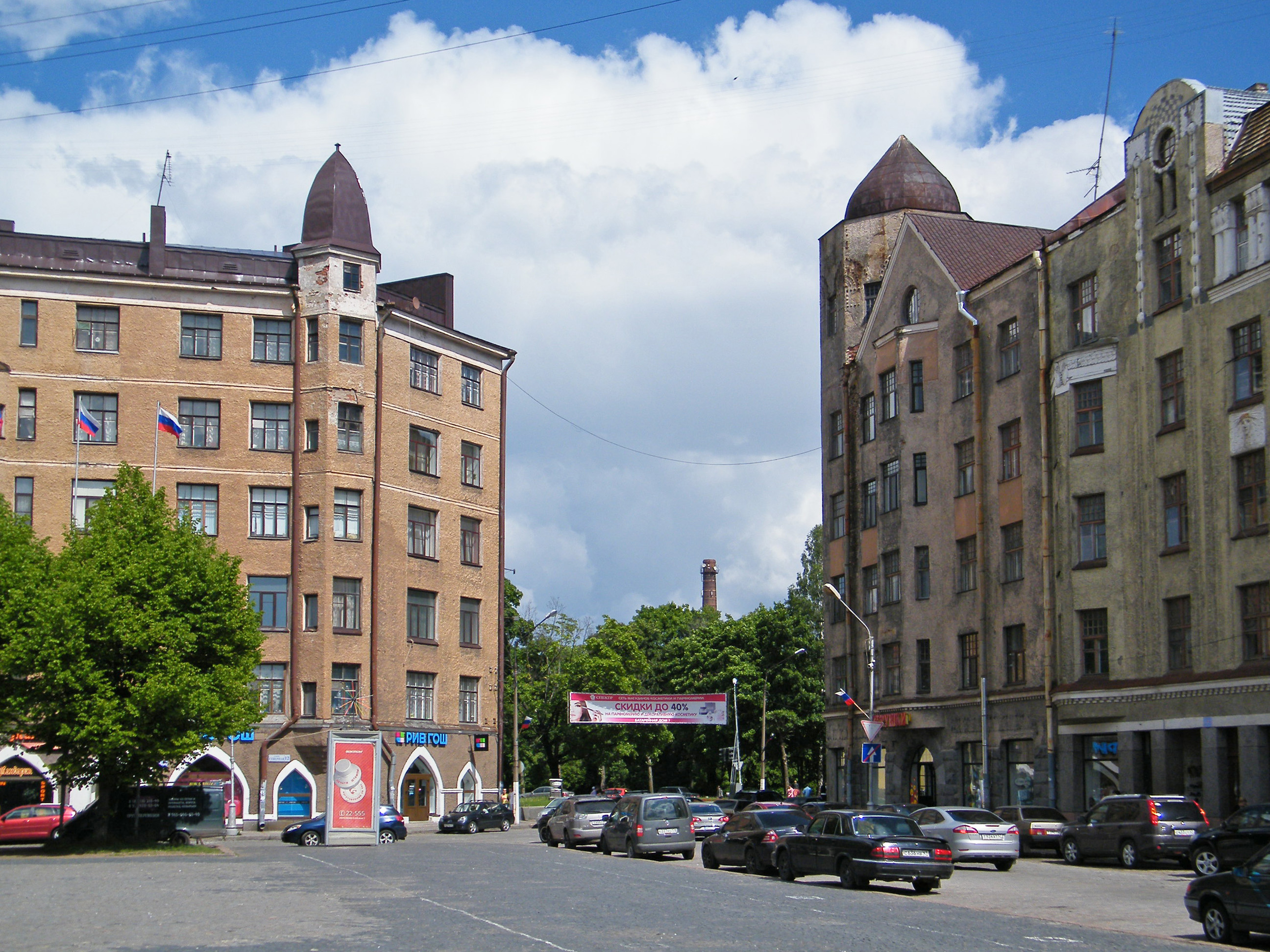 Вид с Красной площади на Ленинградское шоссе